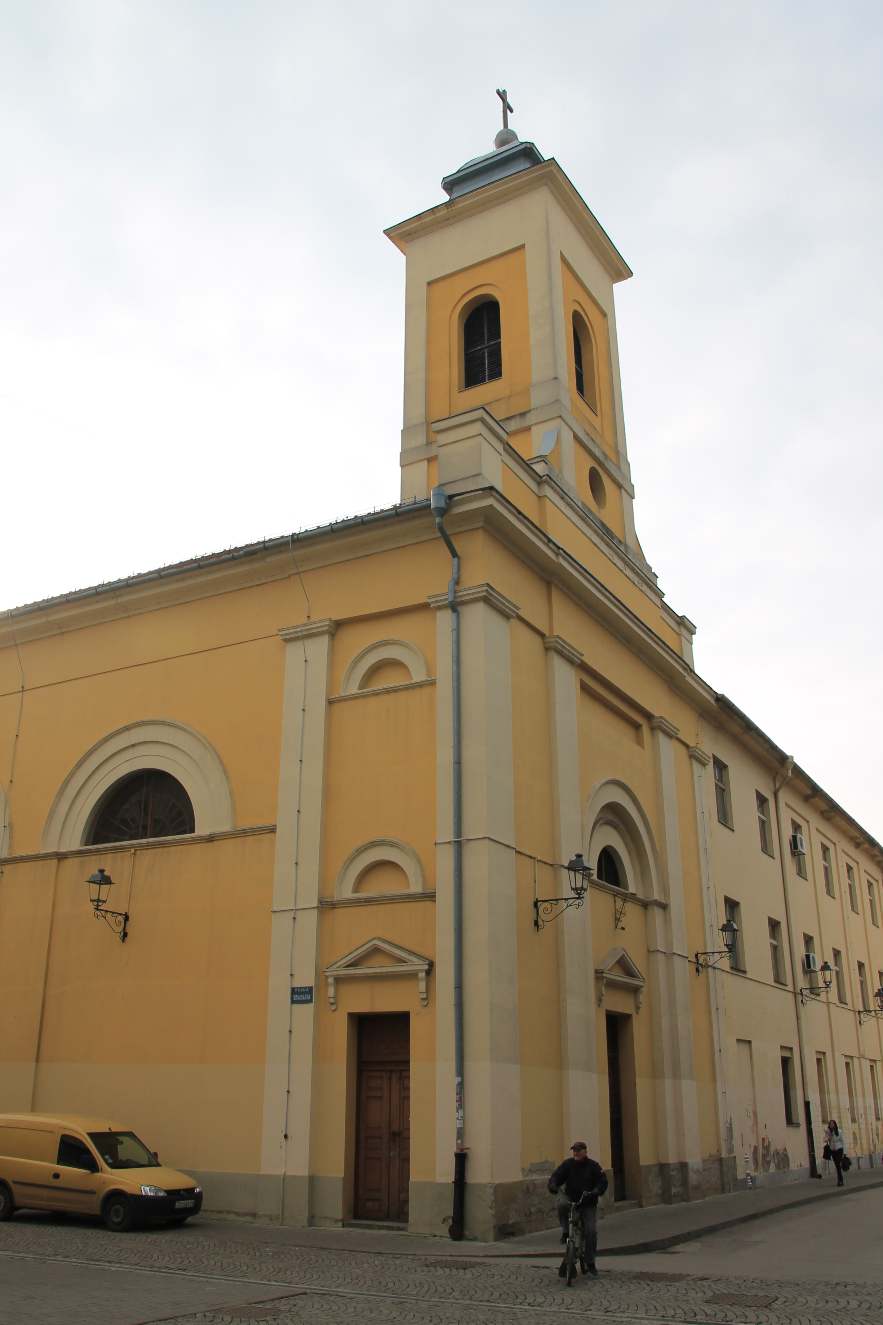 Staro jezgro Zrenjanina